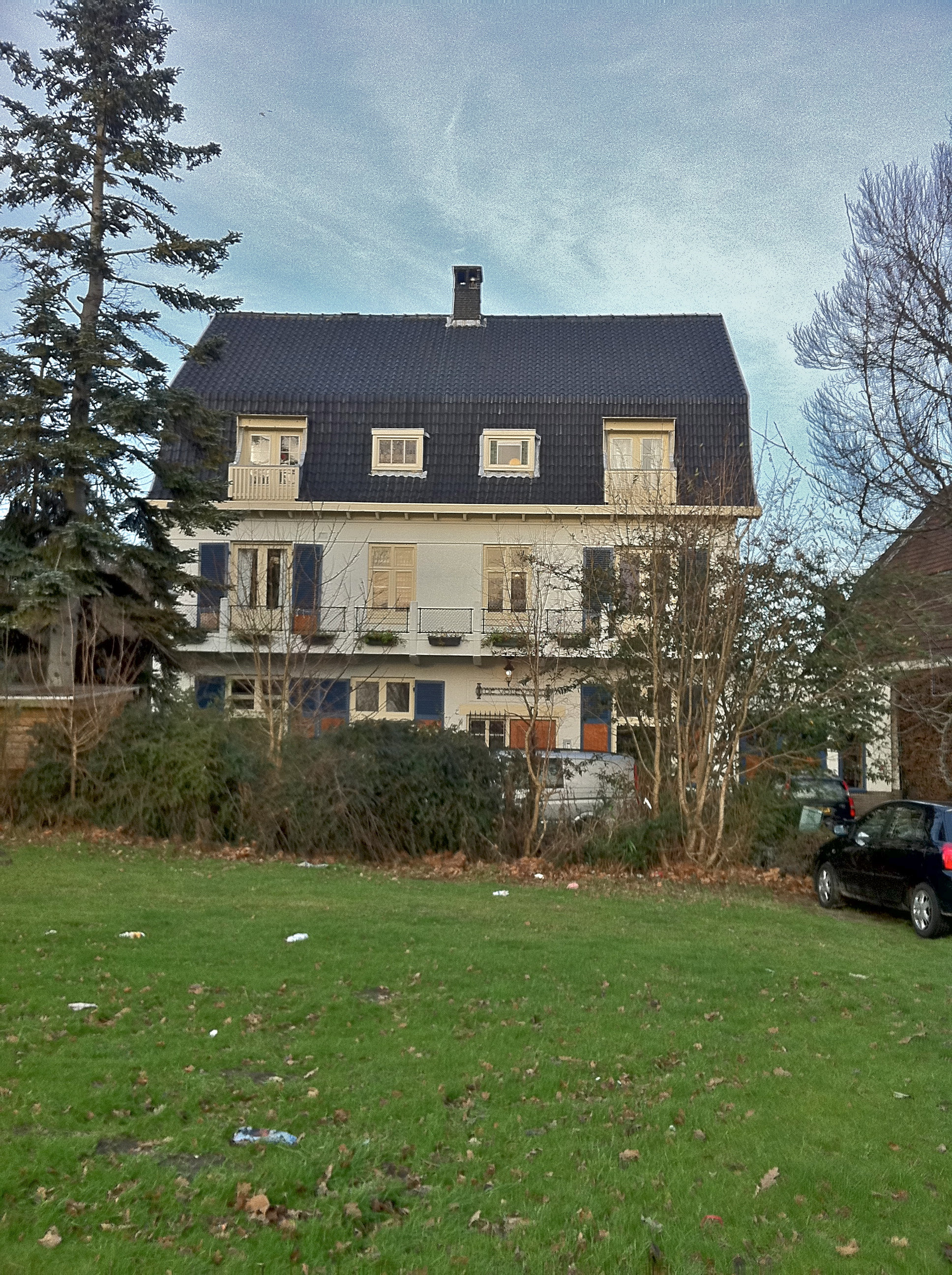 Meeuwenlaan 11, Amsterdam-Noord. Architect Rutgers.